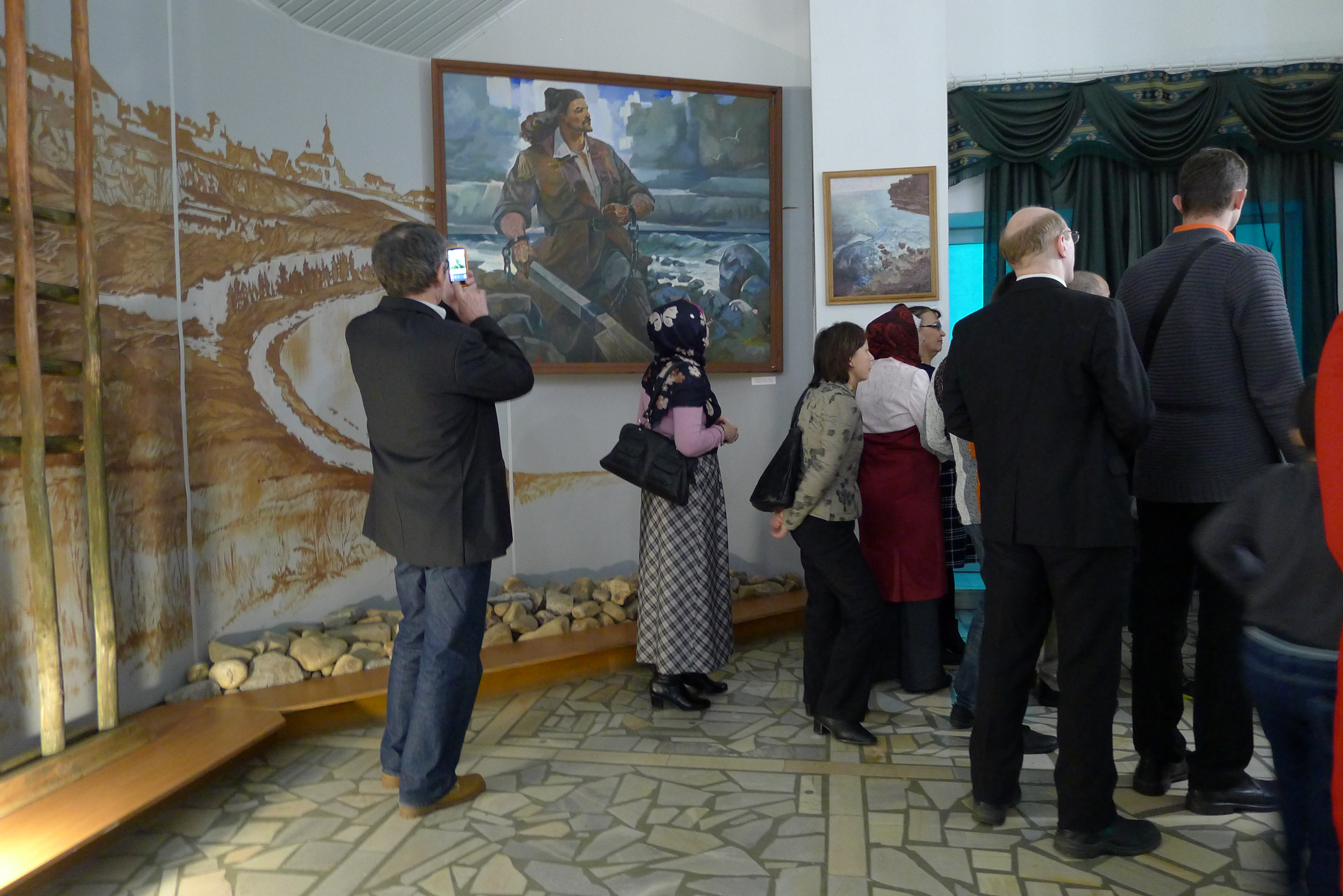 Саха тыла: Салават Юлаев түмэлэ (Башкортостан өрөспүүбүлүкэтин национальнай түмэлин филиала). Салават оройуона, Башкортостаан. Кулун тутар 26 күнэ, 2016 сыл.